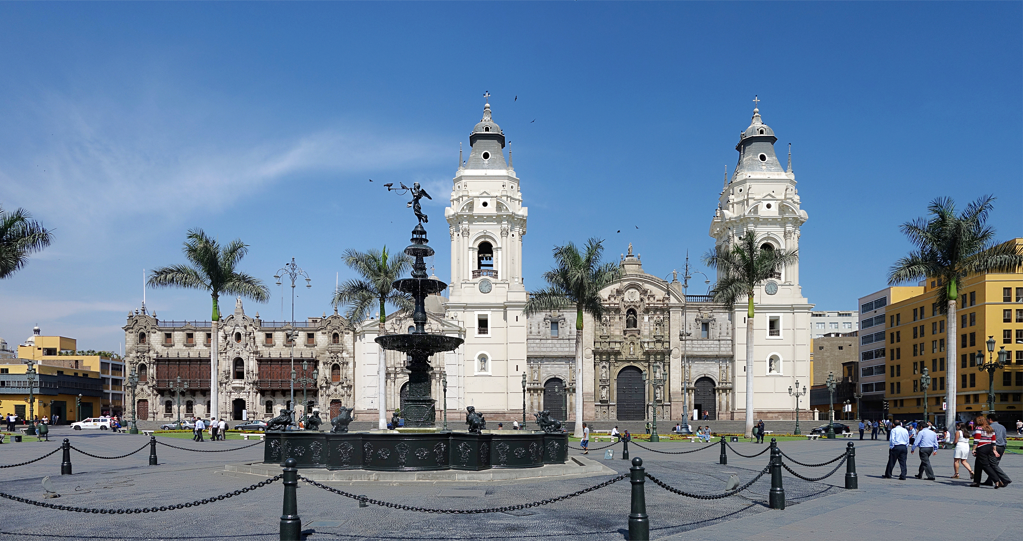 La cathédrale et le palais archiépiscopal de Lima (Pérou).